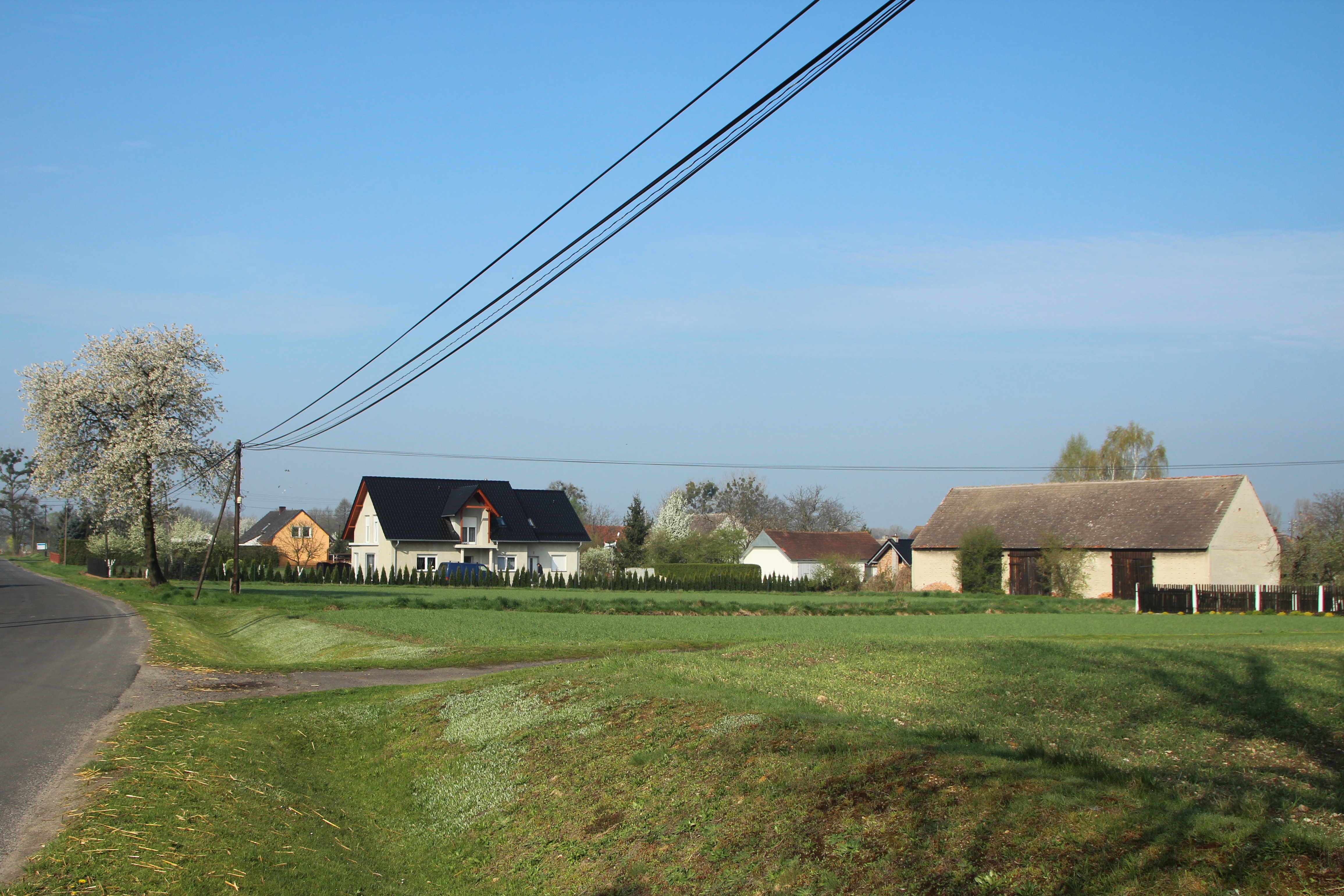 Włostowa – wieś w Polsce położona w województwie opolskim, w powiecie nyskim, w gminie Korfantów.